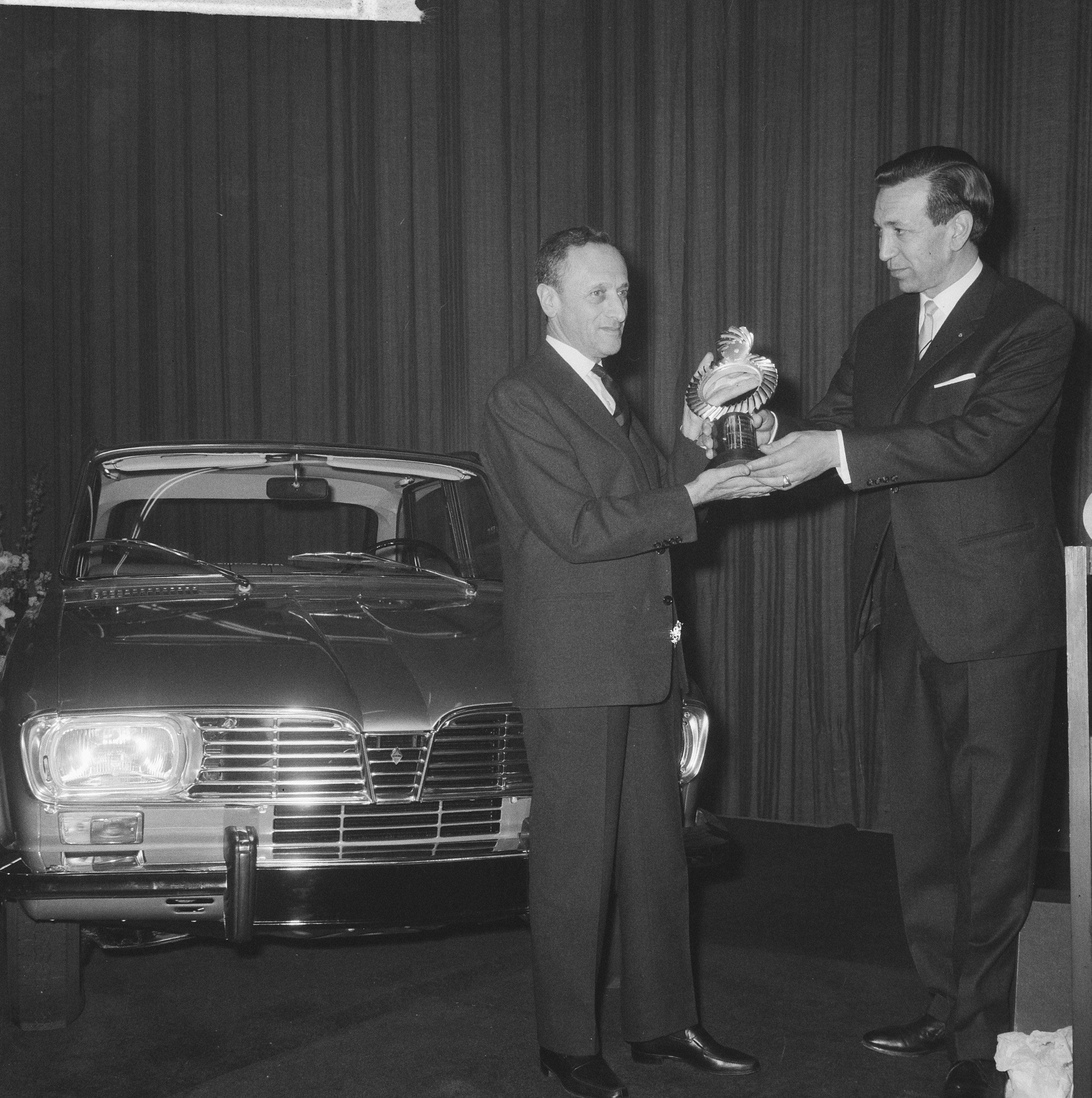 Collectie / Archief : Fotocollectie Anefo Reportage / Serie : [ onbekend ] Beschrijving : Trophee Auto van het jaar uitgereikt aan President-Directeur-Generaal van Renault-fabrieken, Pierre Dreyfus Datum : 3 februari 1966 Trefwoorden : trofeeen Fotograaf : Nijs, Jac. de / Anefo Auteursrechthebbende : Nationaal Archief Materiaalsoort : Negatief (zwart/wit) Nummer archiefinventaris : bekijk toegang 2.24.01.03 Bestanddeelnummer : 918-7478